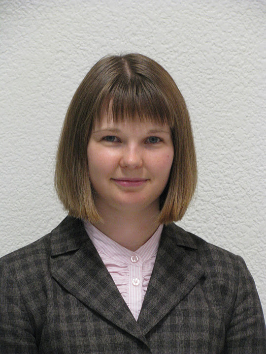 Maris Aleksašin